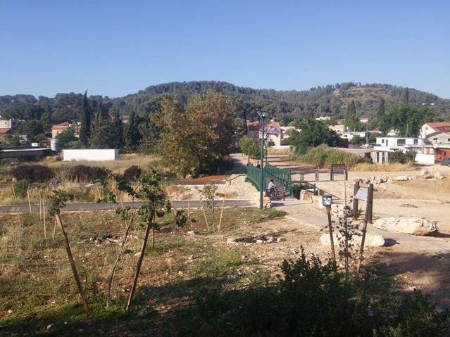 מסלול הטיילת במושב חוסן נכון לשנת 2017 ביוני.